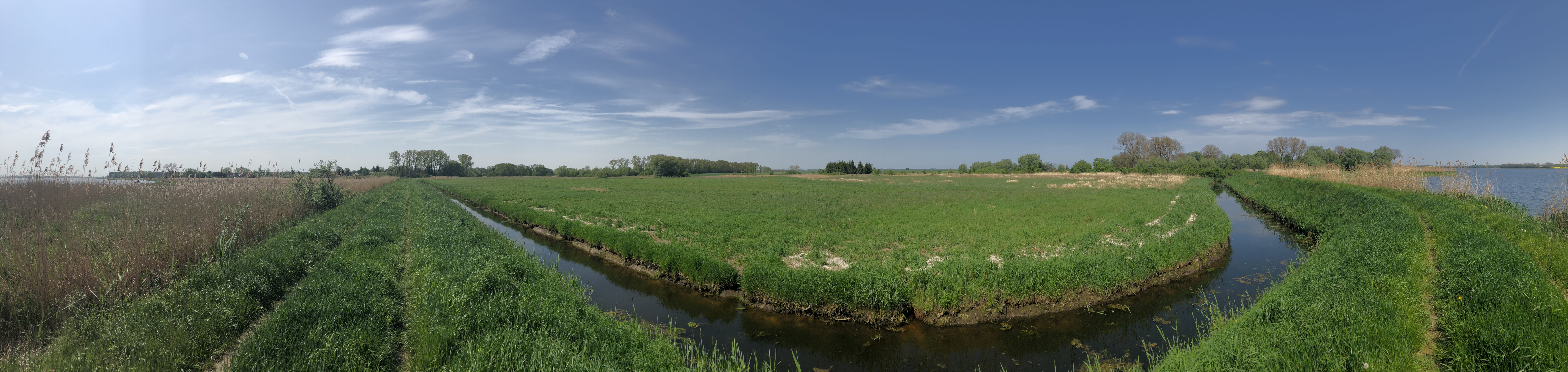 Zdjęcie przedstawia wał retencyjny w Łojszynie